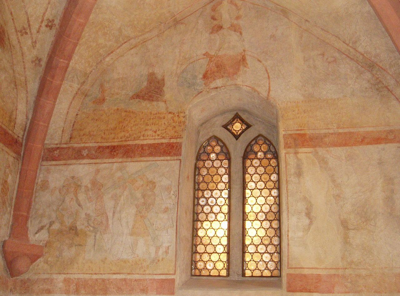 Chor mit Fresken in der Kirche von Wittelbach